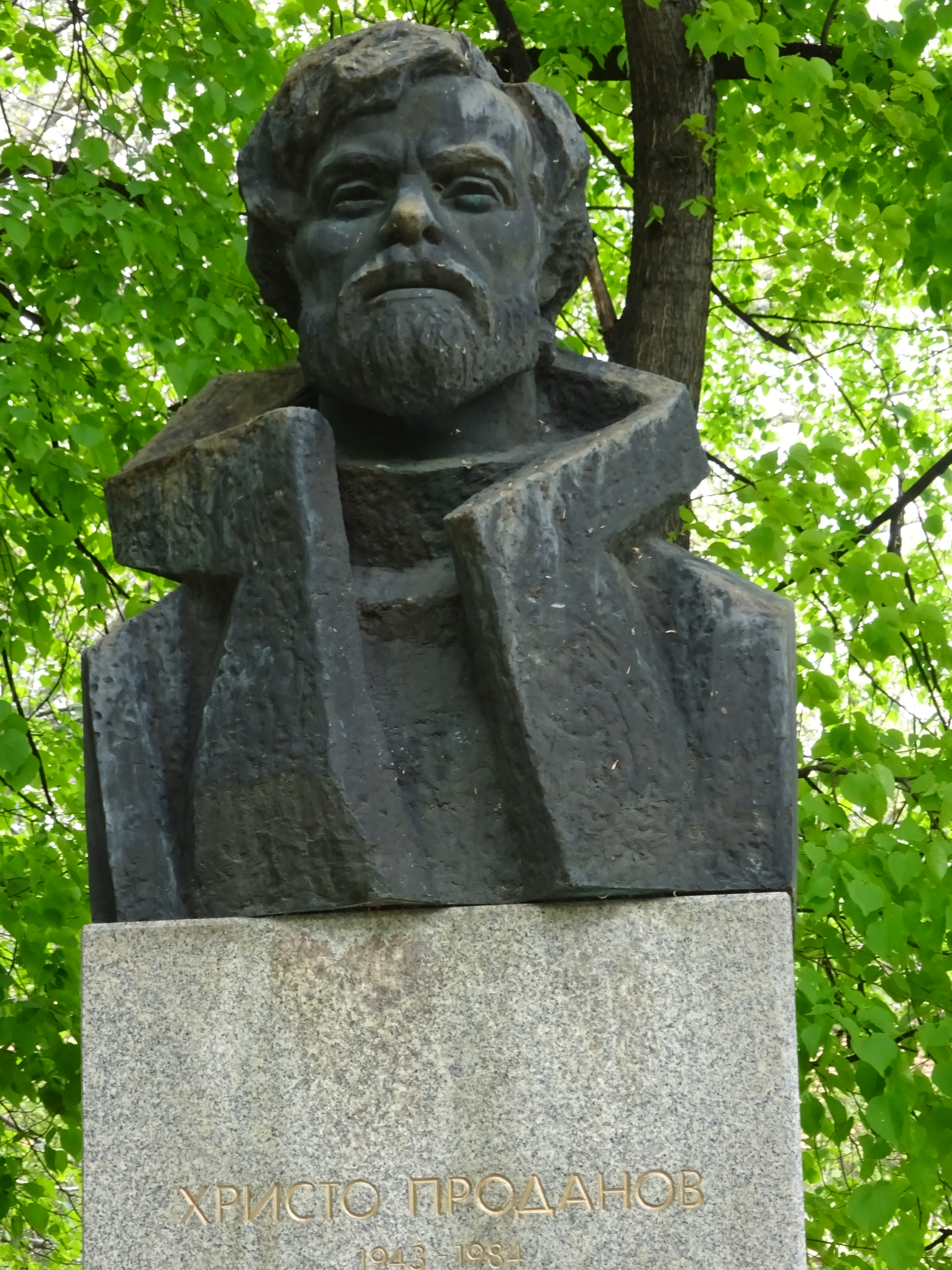 Христо Проданов, Карлово